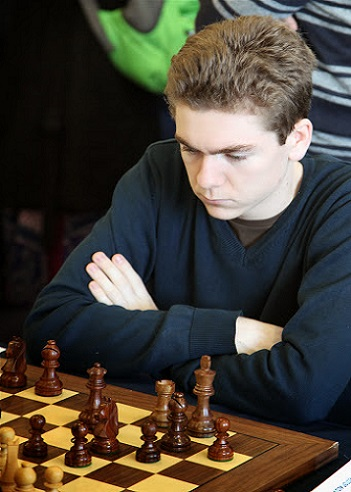 GM David Antón Guijarro